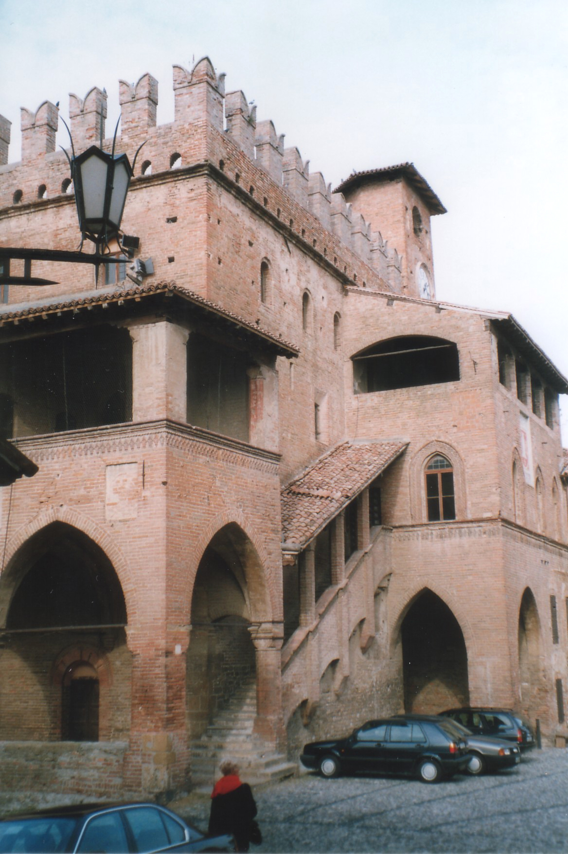 Autore Giorces.